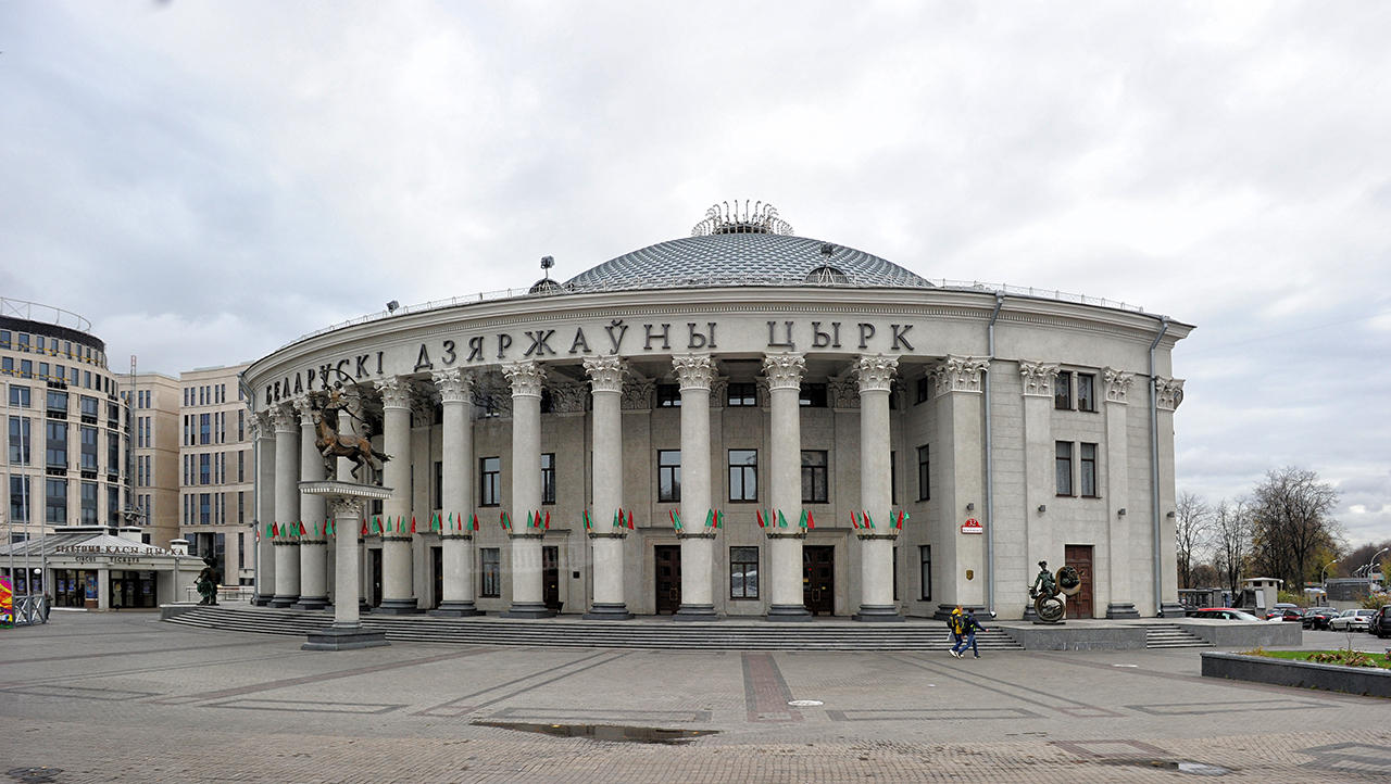 Главное здание госцирка 2014